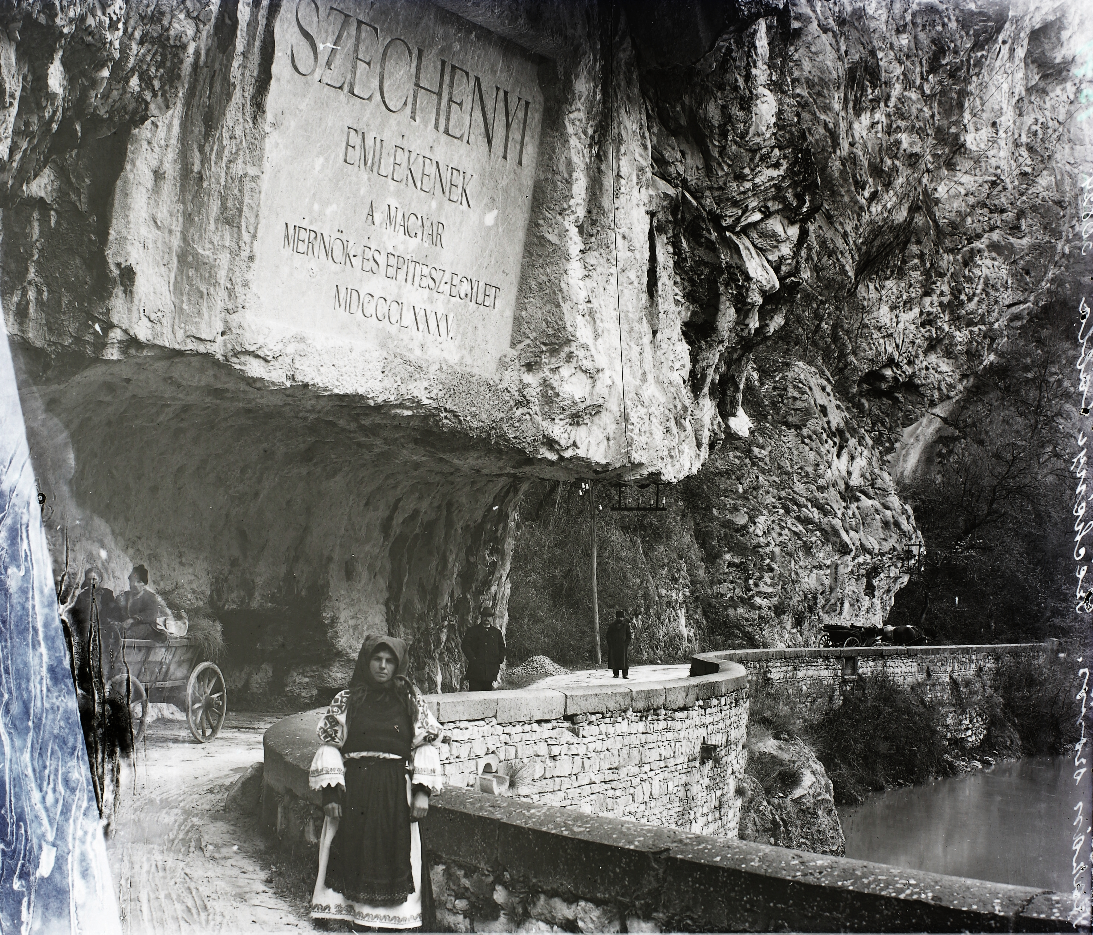 Duna, a Vaskapu-szoros, Széchenyi-út, gróf Széchenyi István emléktáblája. Location: Romania, Serbia Title: Duna, a Vaskapu-szoros, Széchenyi-út, gróf Széchenyi István emléktáblája.